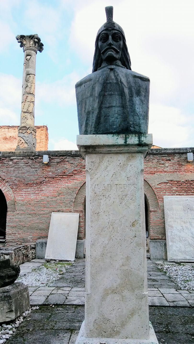 Busto nel Centro Vecchio di Bucarest